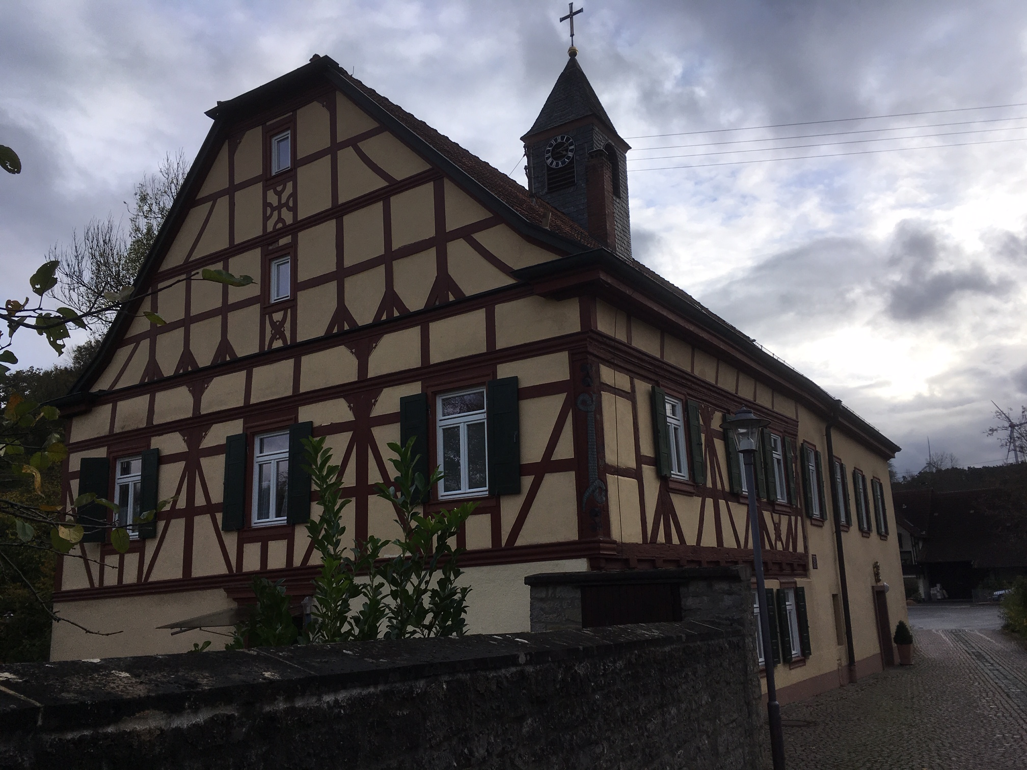 ehem. Schloss zu Angeltürn, auch Ficksches Schloss genannt, heute Pfarrhaus und katholische Kircheerbaut 1617, der Teil in welchem sich die Kirche befindet wurde 1764-1770 vom Freiherr von Fick angebaut.